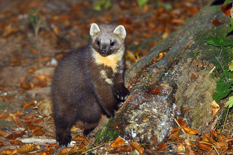 Kuna zlatica (Martes martes)